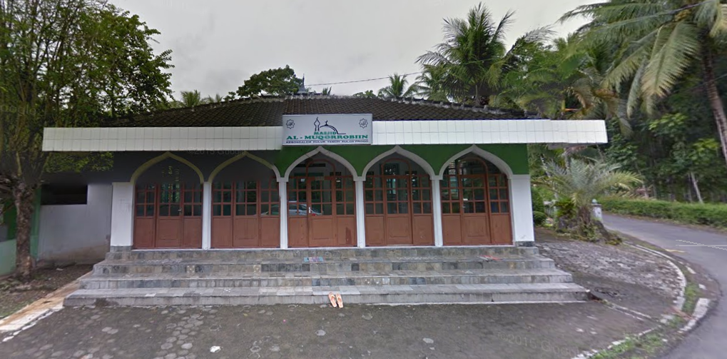 Masjid Kauman Desa Kulur, Masjid Al Muqorrobin yang terletak di Pedukuhan Kebondalem, Desa Kulur, Kecamatan Temon, Kabupaten Kulon Progo